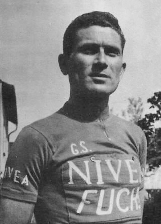 Virgilio Salimbeni